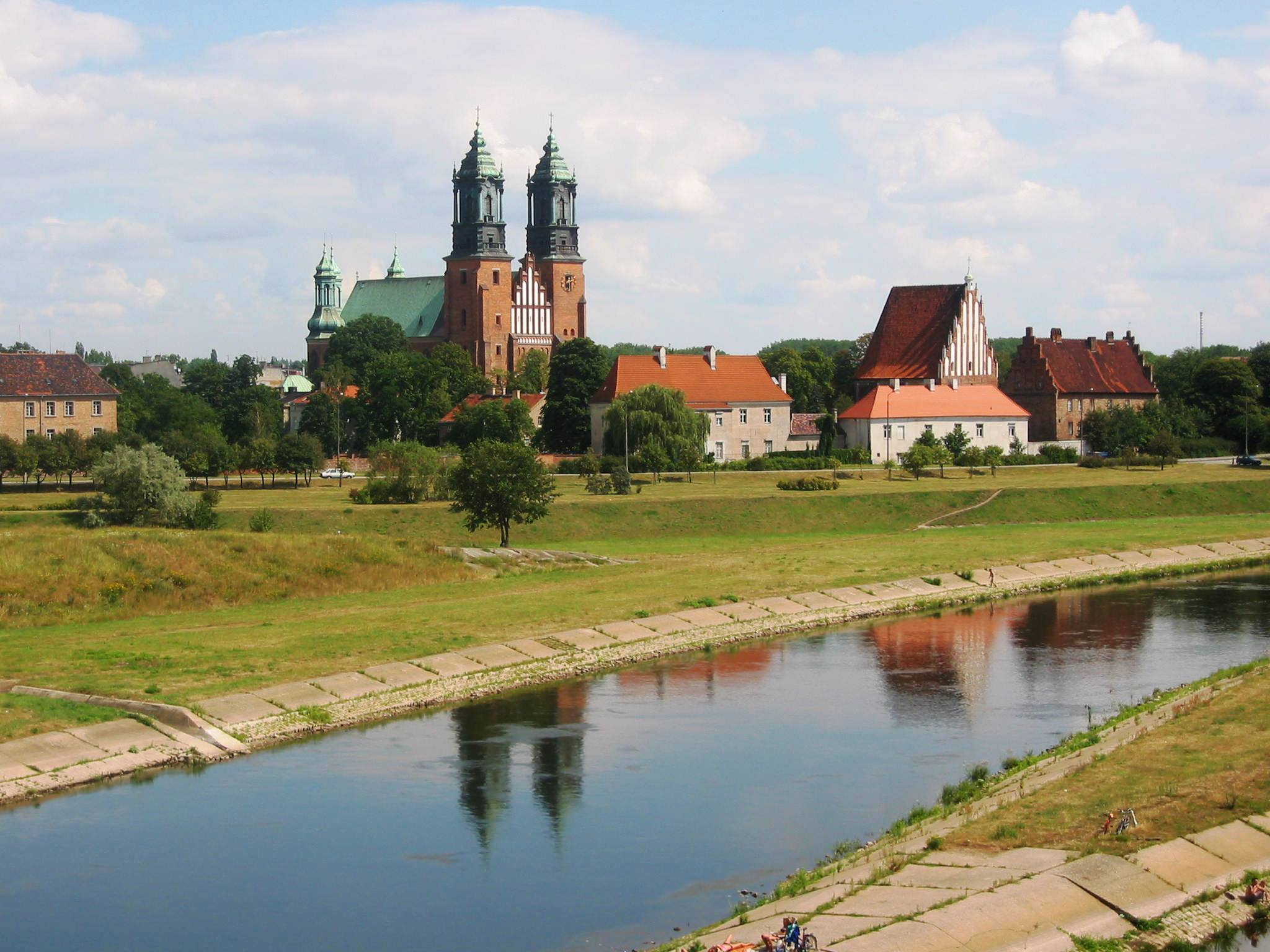 photo Radomil